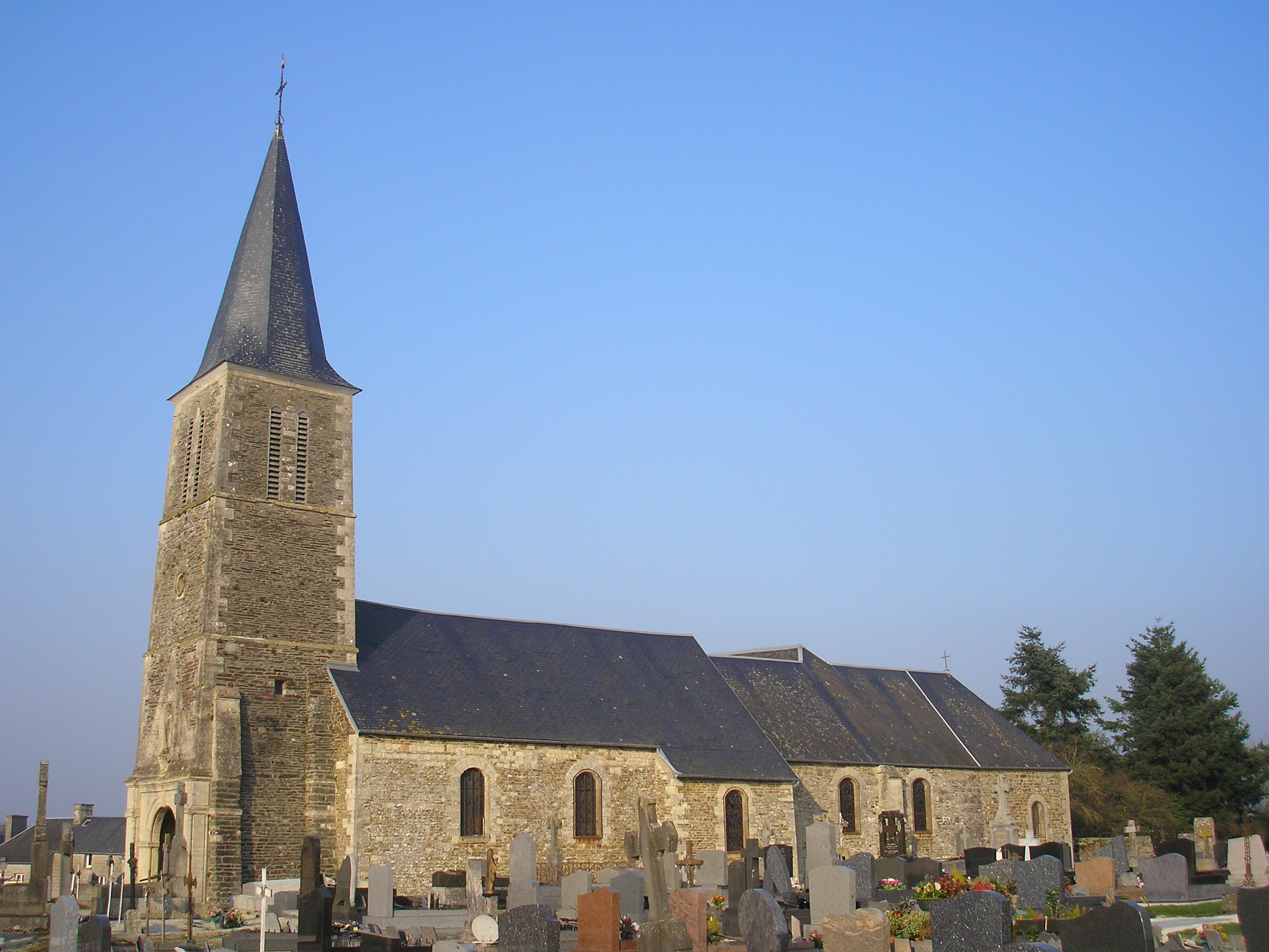 Dampierre (Normandie, France). L'église Saint-Pierre.